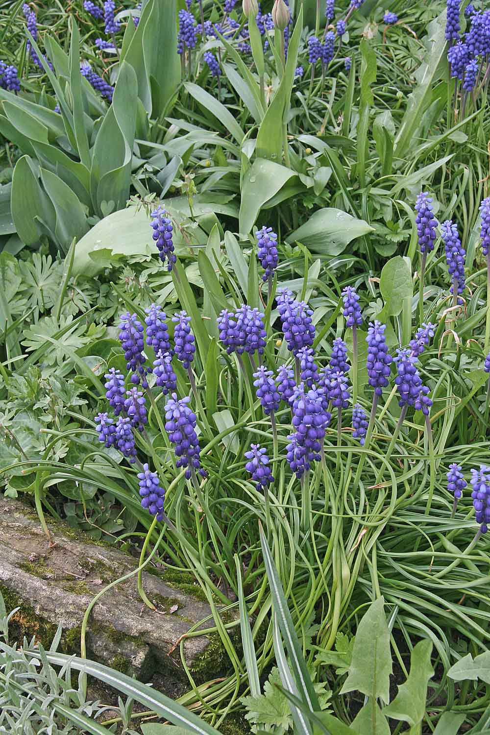 Muscari neglectum author:Prazak